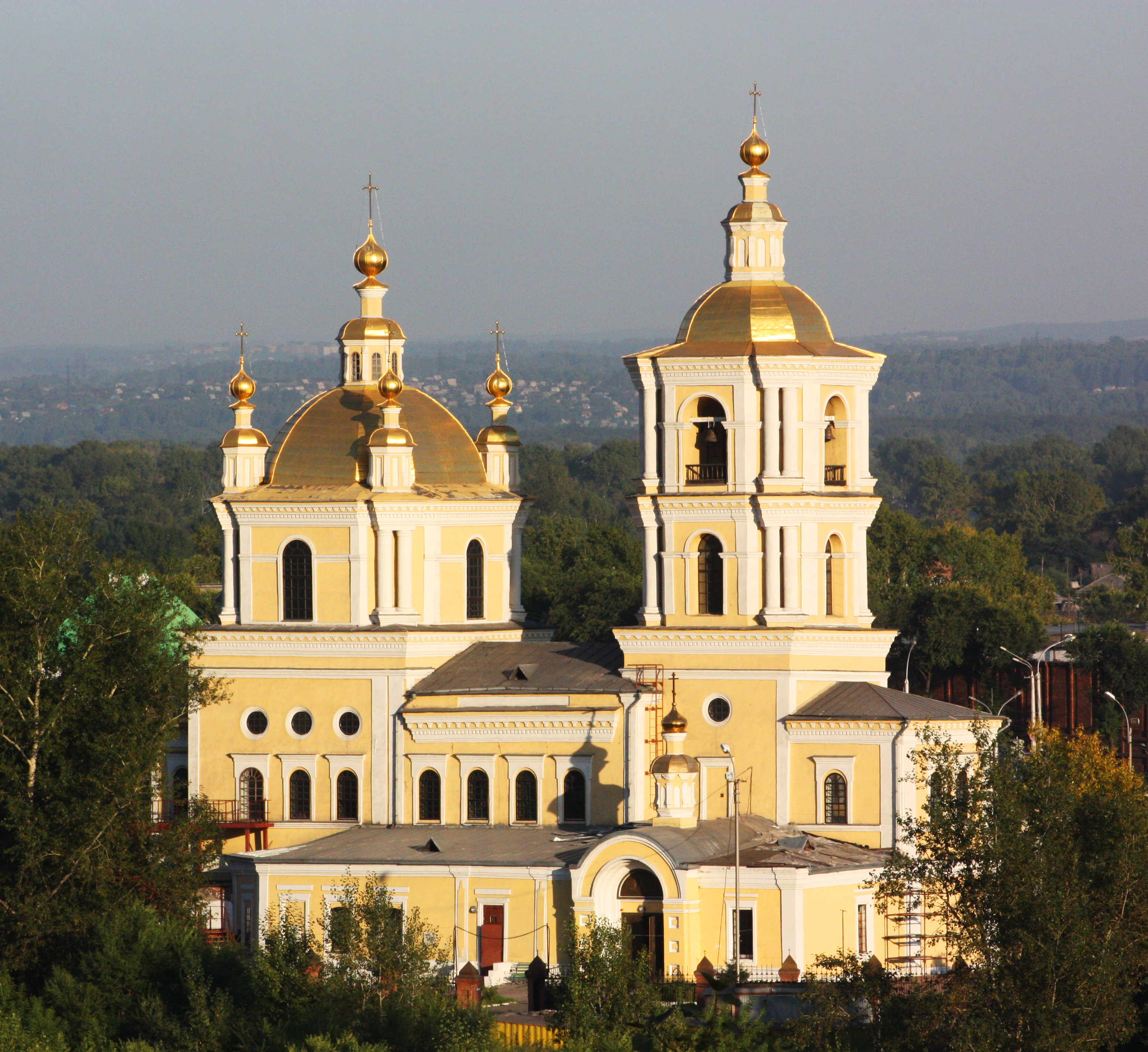 Спасо-Преображенский собор, г. Новокузнецк. Вид с ул. Подкаменная.